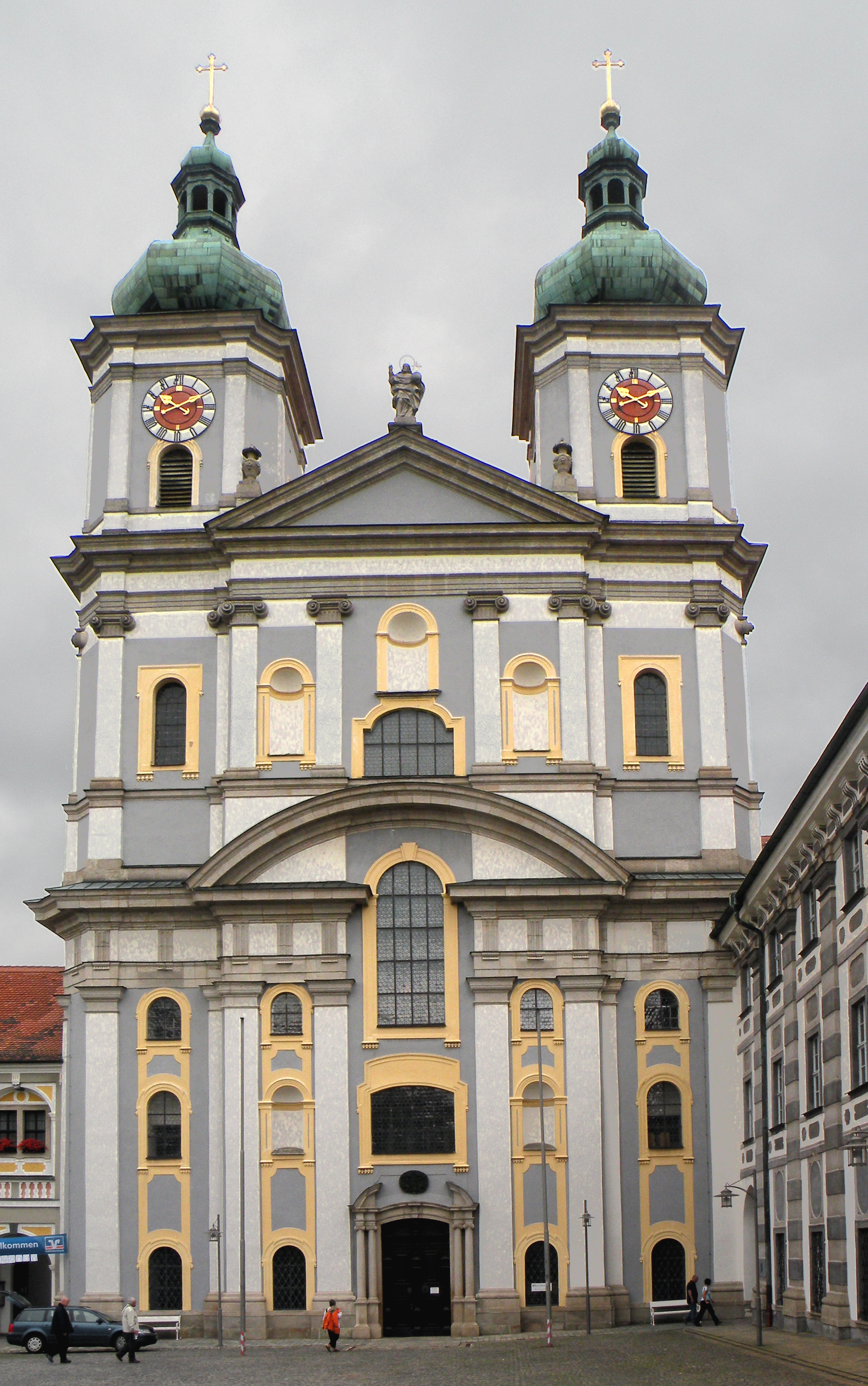 Вальдзассен.Базилика